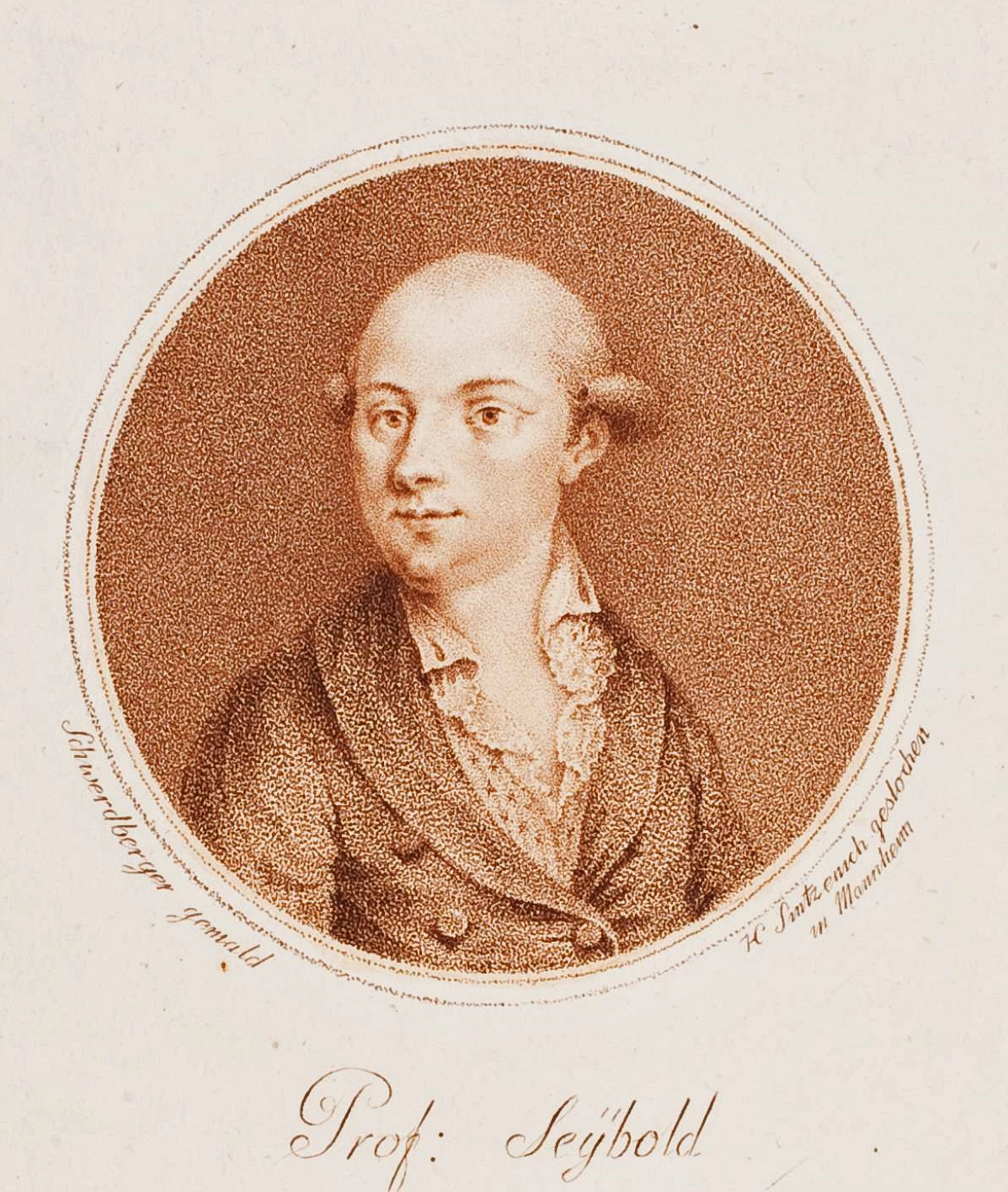 David Christoph Seybold (1747-1804), luth. Theologe, Pädagoge, Dichter